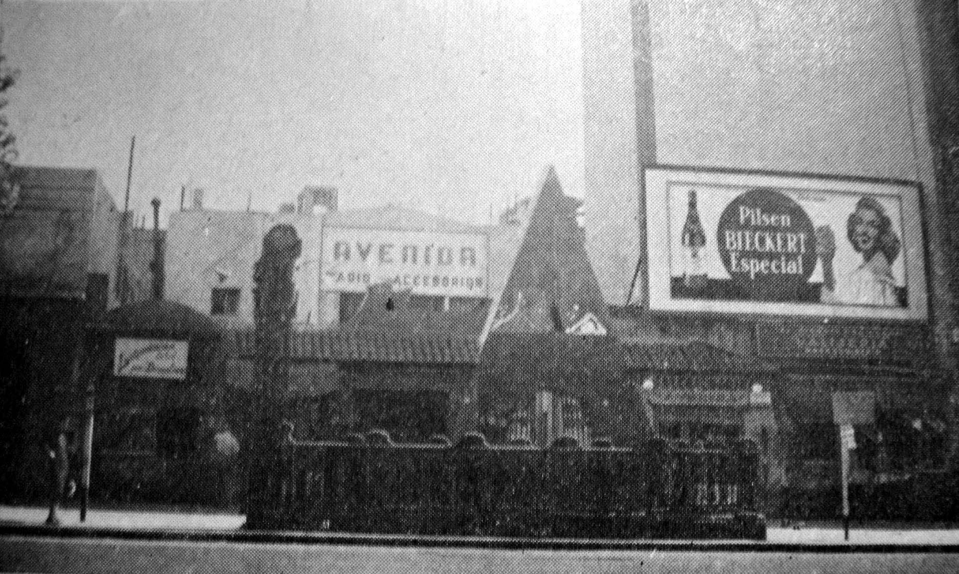 Una de las últimas imágenes tomadas del Parque Goal, una confitería con espectáculos de payadores en la Avenida de Mayo nº 1473. Funcionó entre 1917 y 1930.